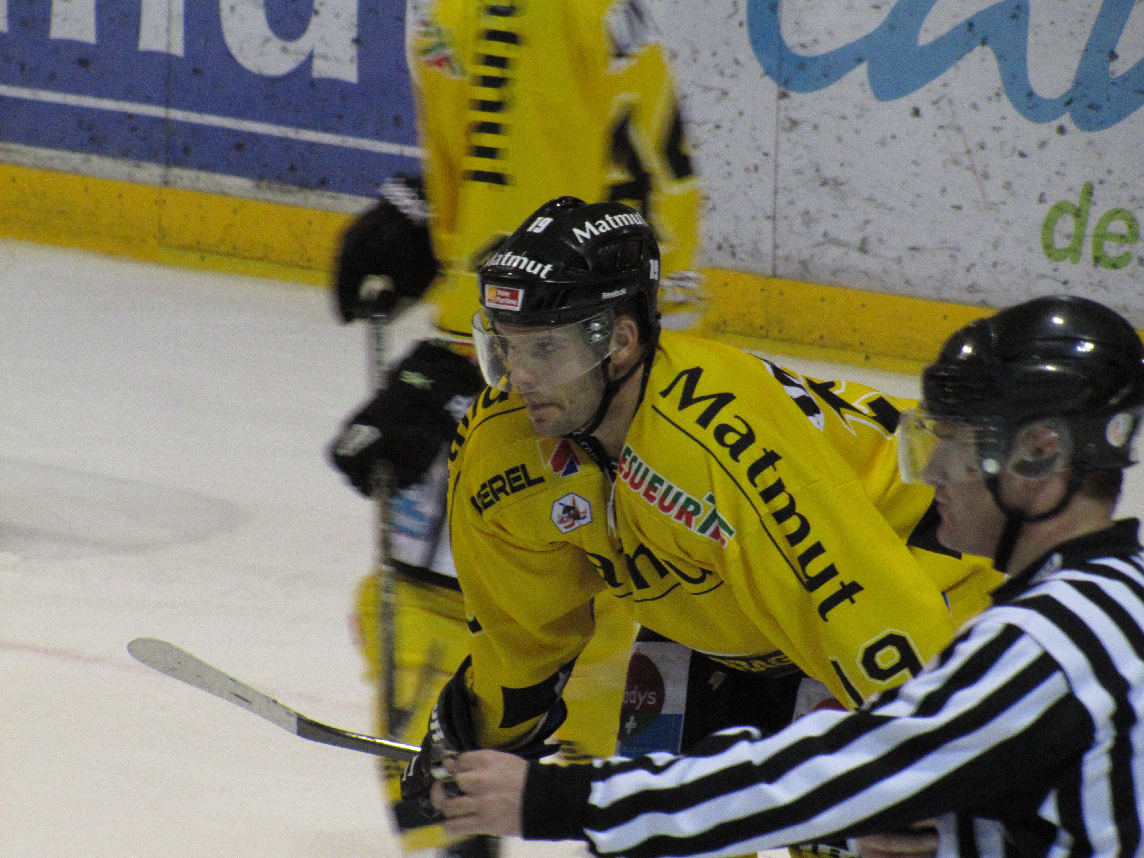 Carl Mallette lors de la Coupe Continentale de hockey 2012